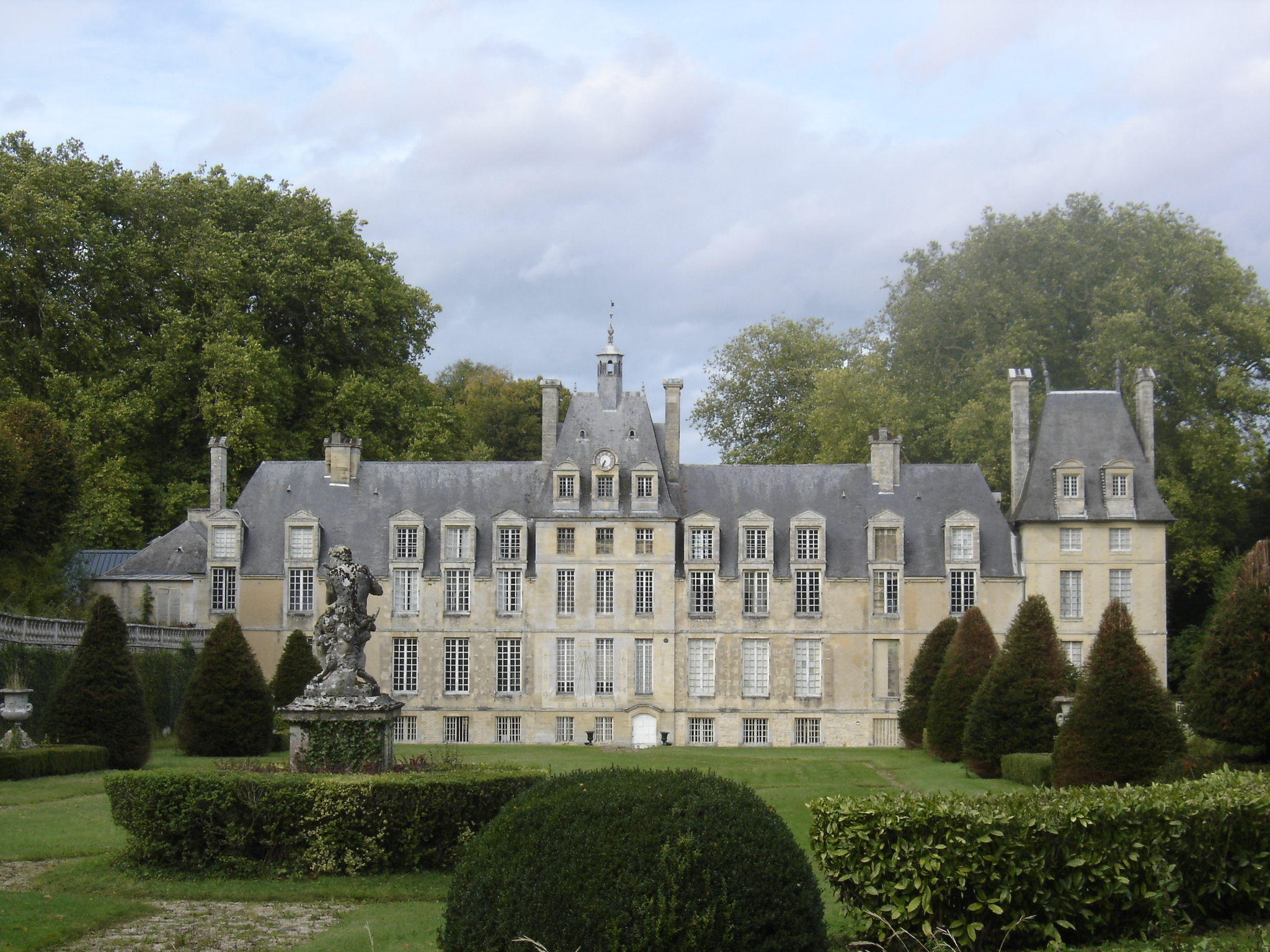 Château de Manneville, (Classé, 2008) façade sud du château de Manneville et jardin à la Française